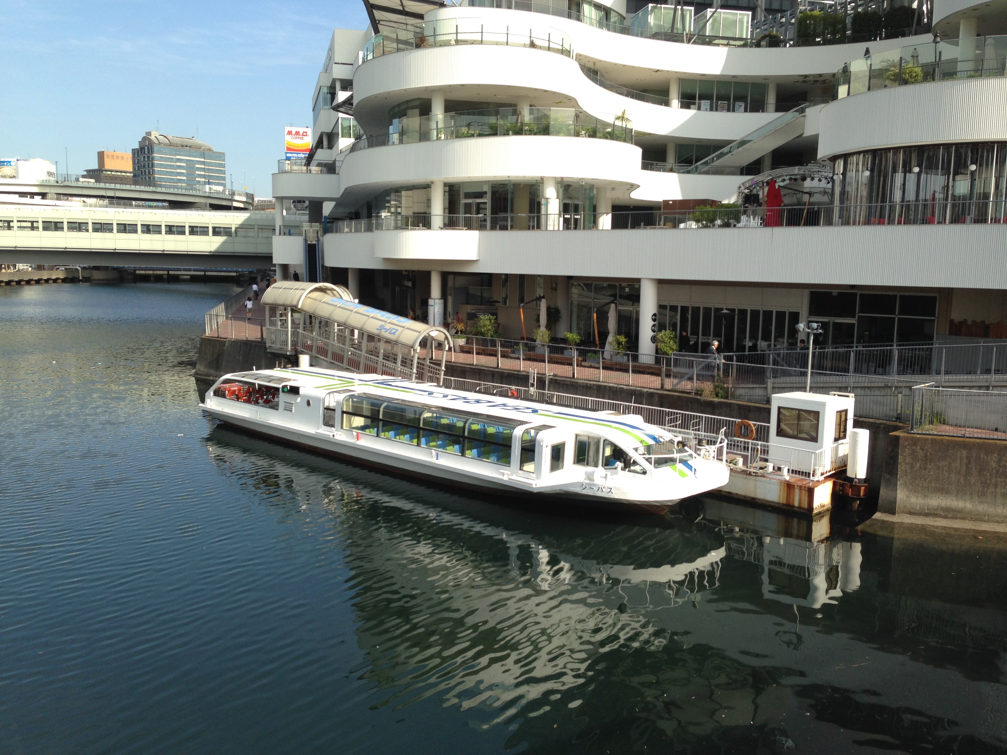 水上交通「シーバス」の横浜駅東口乗り場。ベイクォーター2階に併設。